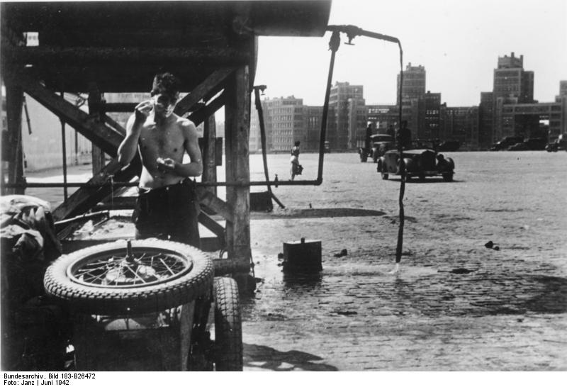 An der Sowjetfront: Auf dem "Roten Platz" in Charkow, dem heutigen "Platz der Wehrmacht", sind Wasserbehälter aufgestellt, die zur Sicherstellung der Wasserversorgung dienen.- Ein durchfahrender Kradfahrer nutzt diese Gelegenheit zur "Grossen Wäsche" aus. PK-Aufnahme: Kriegsberichter Janz; Scherl